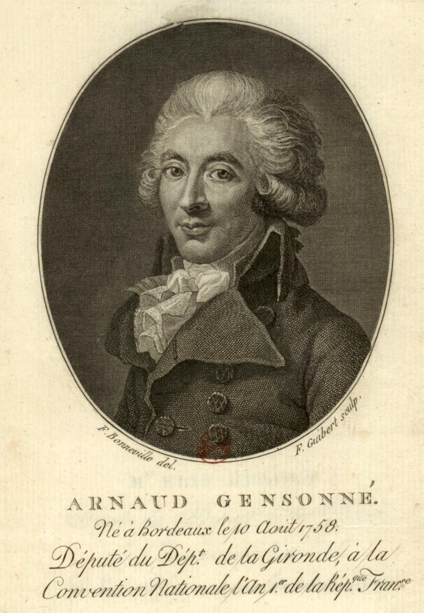 Der französische Revolutionär Armand Gensonné (1758–1793).